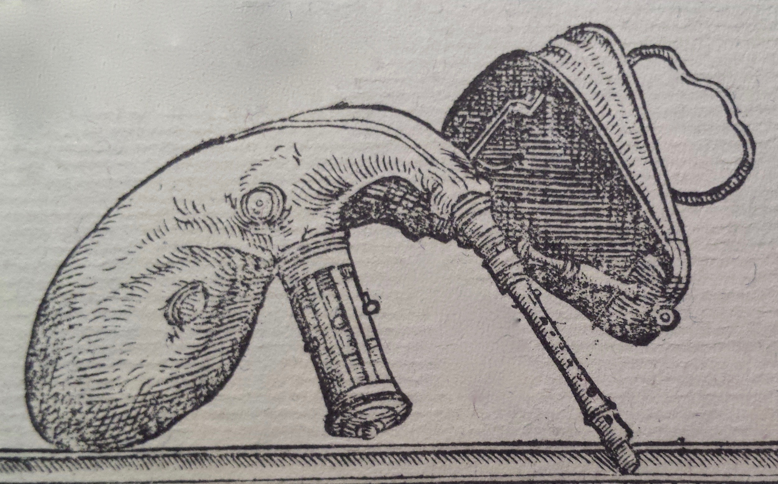 Sackpfeiff mit dem Blaßbalg